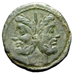 Асс, медь Дата чеканки: 100 г. до н. э. Монетный двор: Рим вес: 26.65 г АВЕРС: Голова Януса в лавровом венке; вверху I. РЕВЕРС: Корабельный нос вправо, перед ним фигура из трех ног, triquetra; вверху надпись LENT. MAR. F. (NT, MAR — монограммой) (Lentulus Marcelli filius), внизу ROMA.